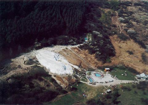 Egerszalók, Hungary, aerialphotography